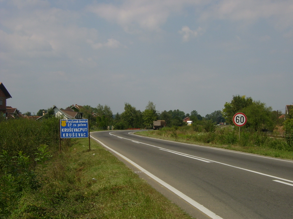 Ulaz u selo Vrba